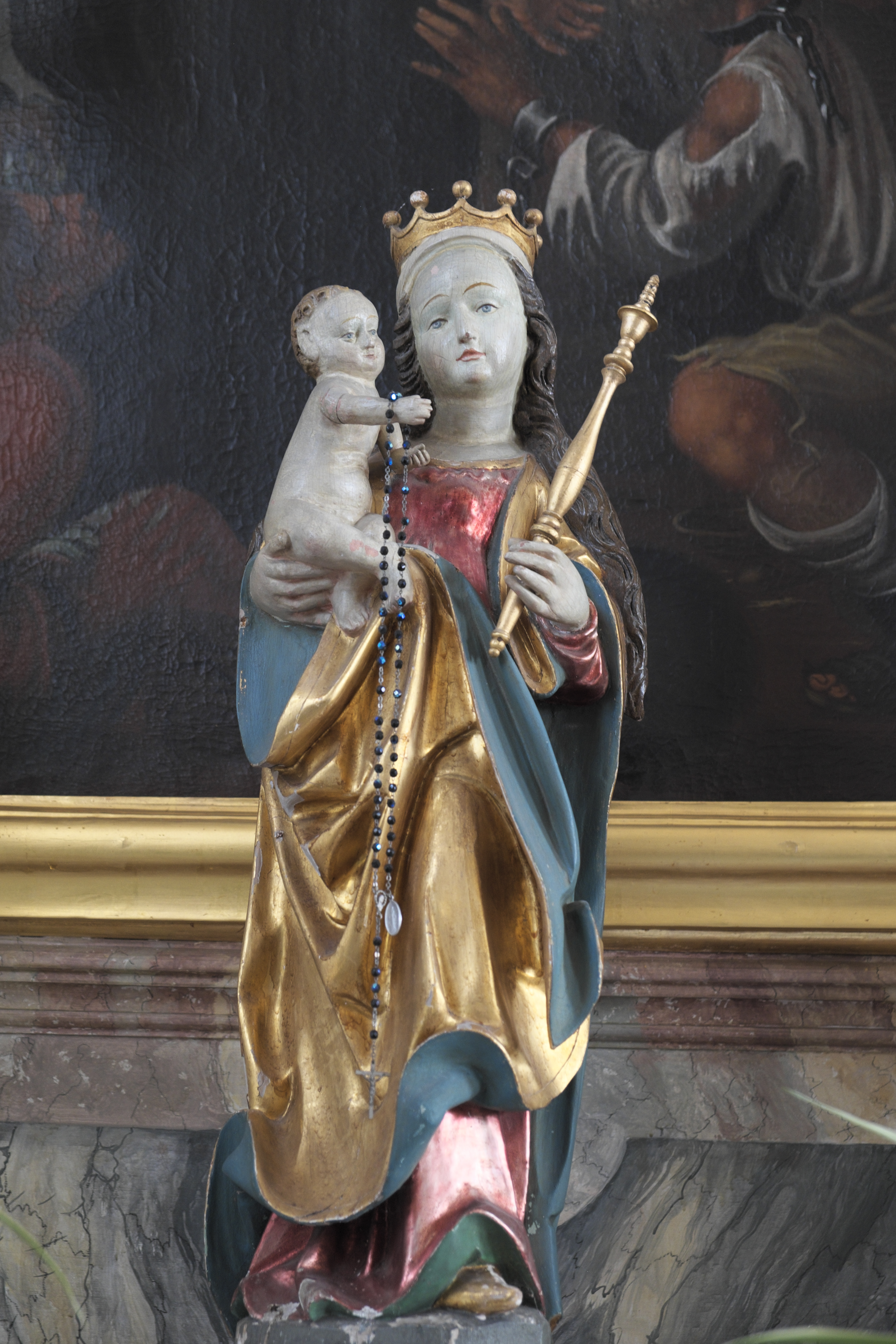 Katholische Filialkirche St. Martin in Niederstraubing (Steinkirchen) im Landkreis Erding (Bayern/Deutschland), Leonhardaltar, Madonna mit Kind, Anfang 16. Jahrhundert